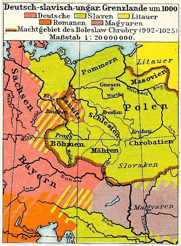 Fragment aus:Deutschland zur Zeit der sächsischen und fränkischen Kaiser